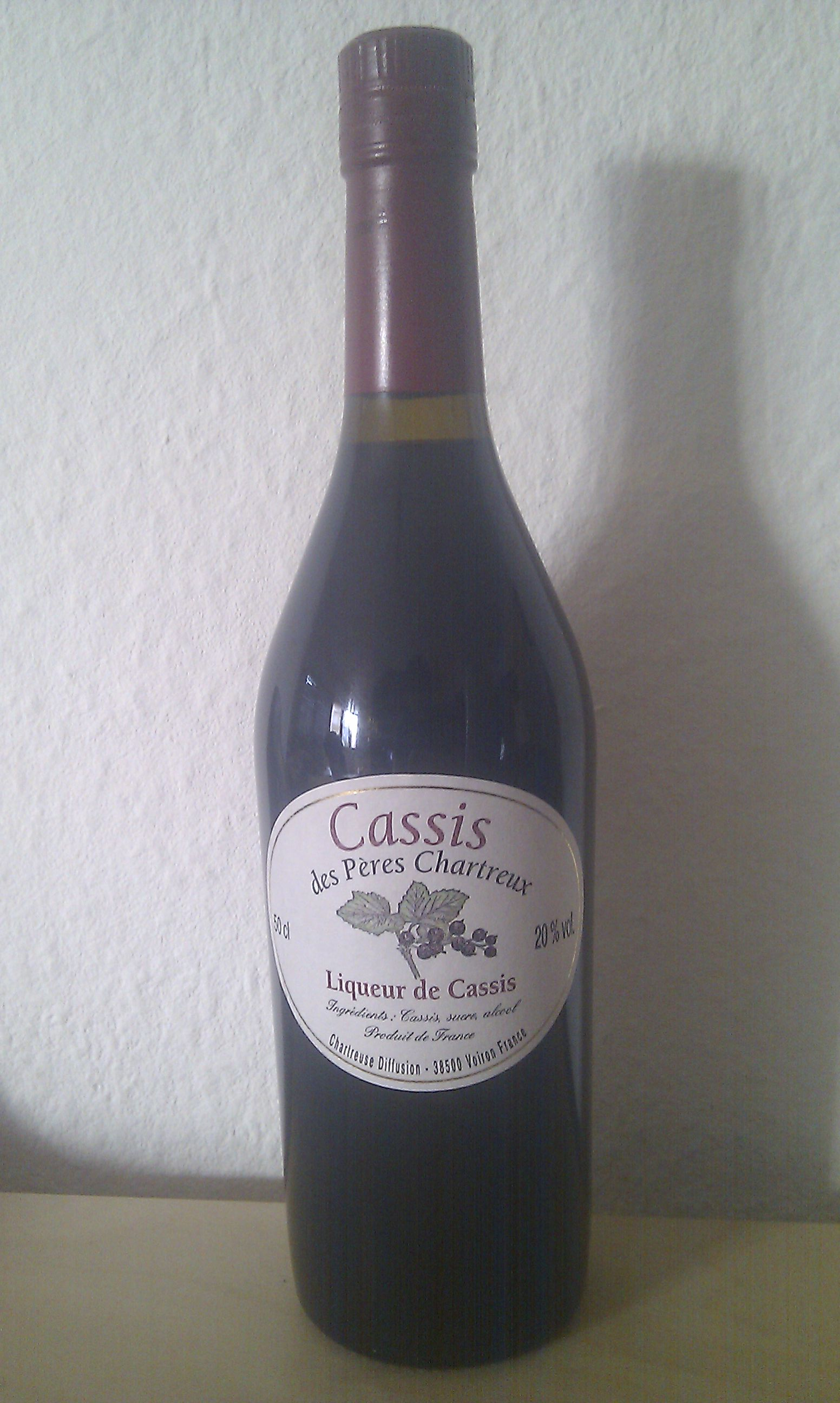 Chartreuse, schwarze Johannisbeere